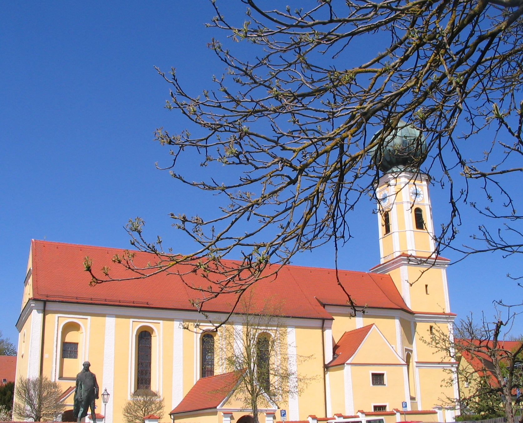 Pfarrkirche St.Vitus in Offenstetten, Landkreis Kelheim, Niederbayern